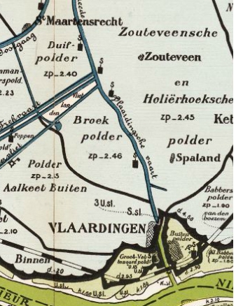 Broekpolder_(Vlaardingen)